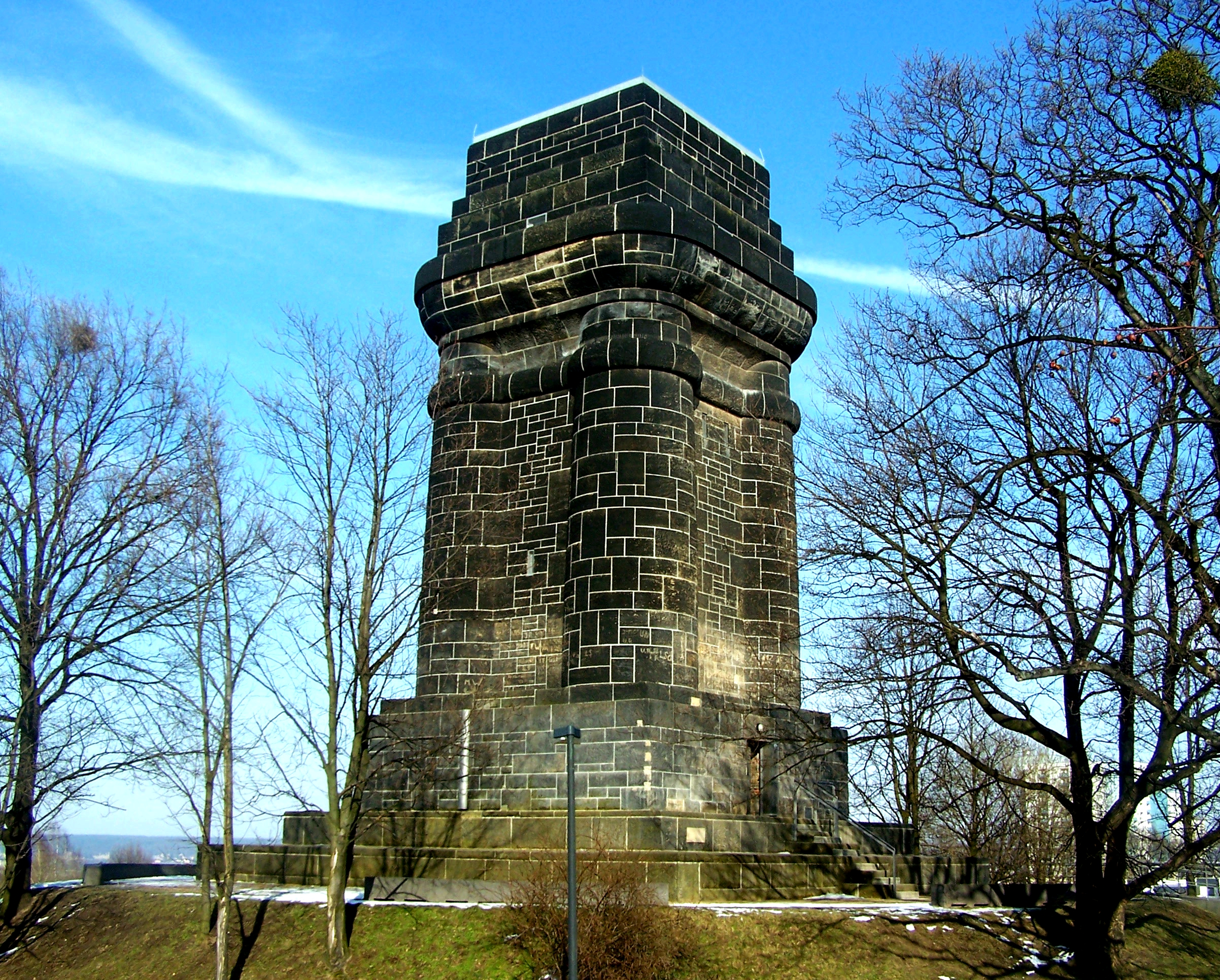 Bismarckturm Dresden-Räcknitz